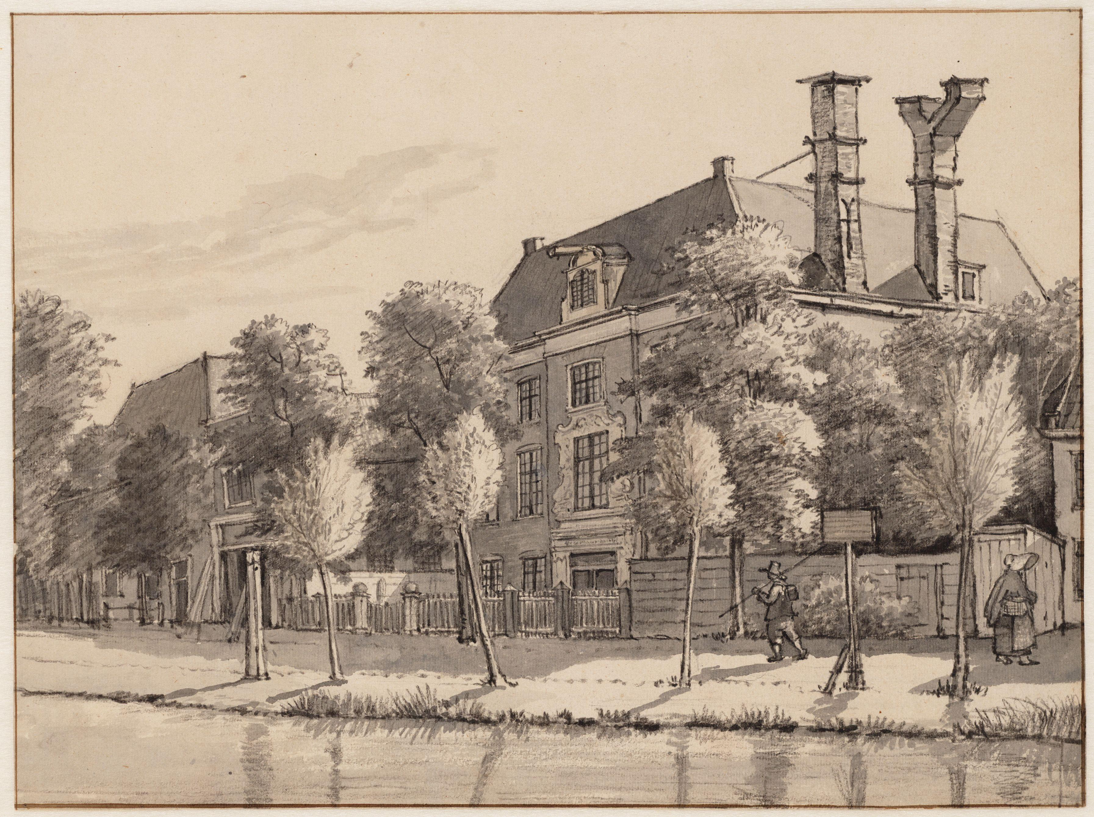 Het hofje De Eendracht. Tekening. Afmetingen onbekend. Amsterdam, Stadsarchief Amsterdam, Collectie tekeningen Van Eeghen.